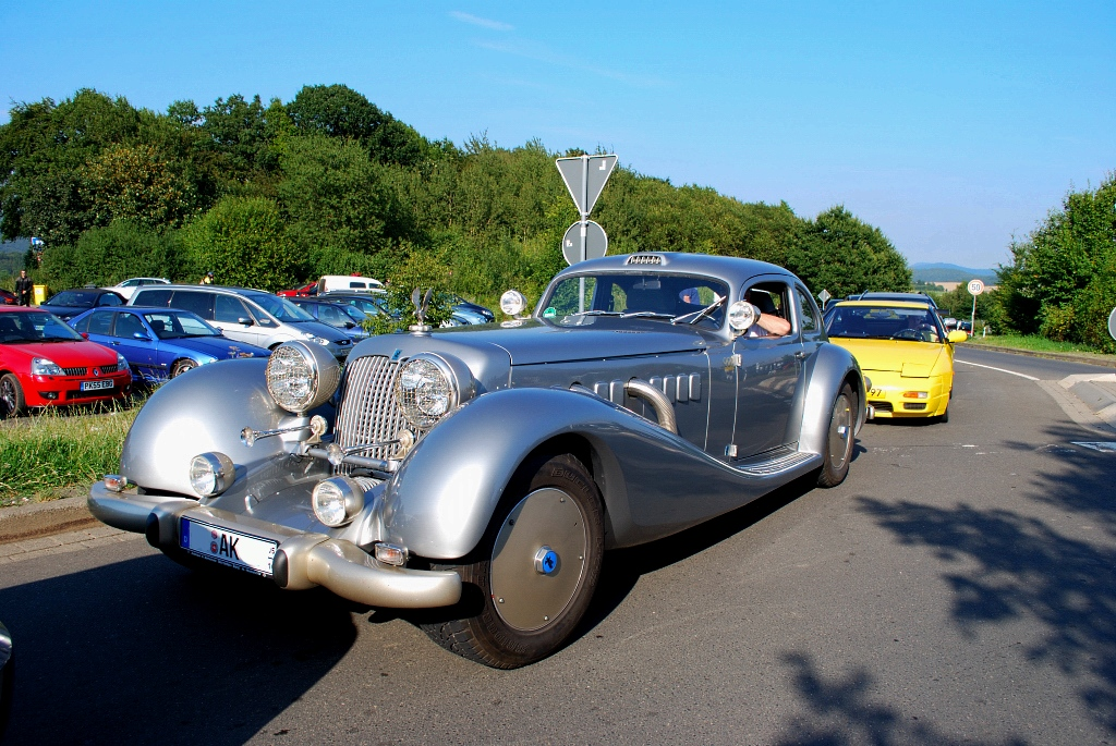 Der Autobahnkurier gesehen im Jahr 2009 an der Nordschleife.